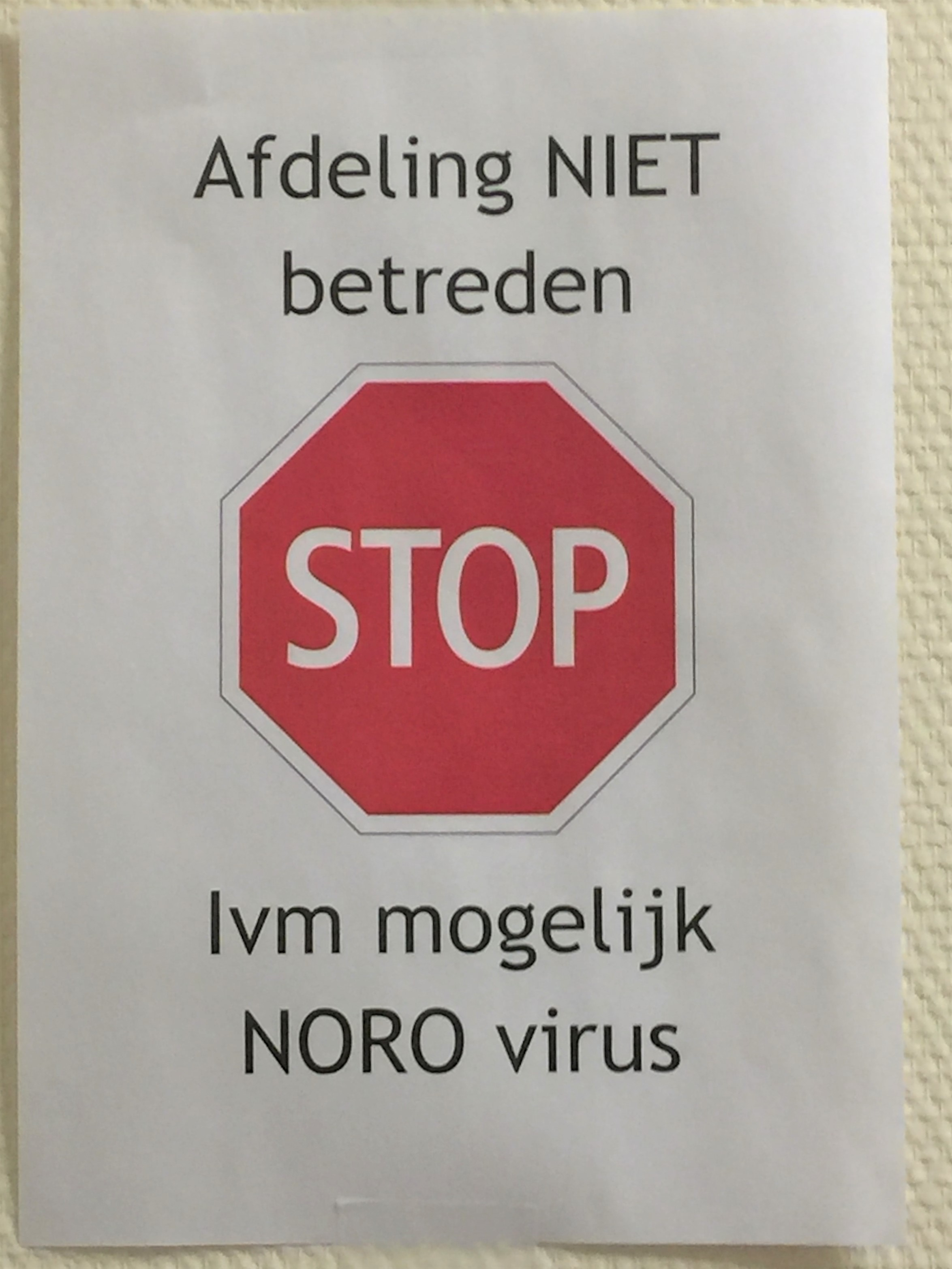 Text reads: STOP. Afdeling niet betreden i.v.m. mogelijk NORO virus